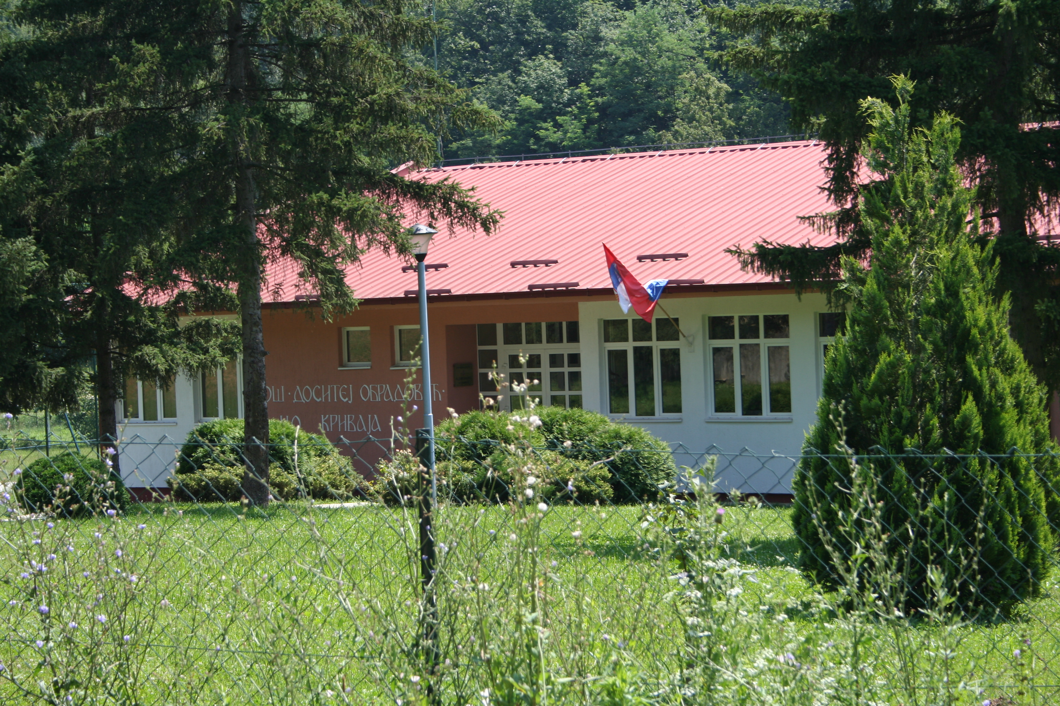 Osnovna škola "Dositej Obradović" Krivaja